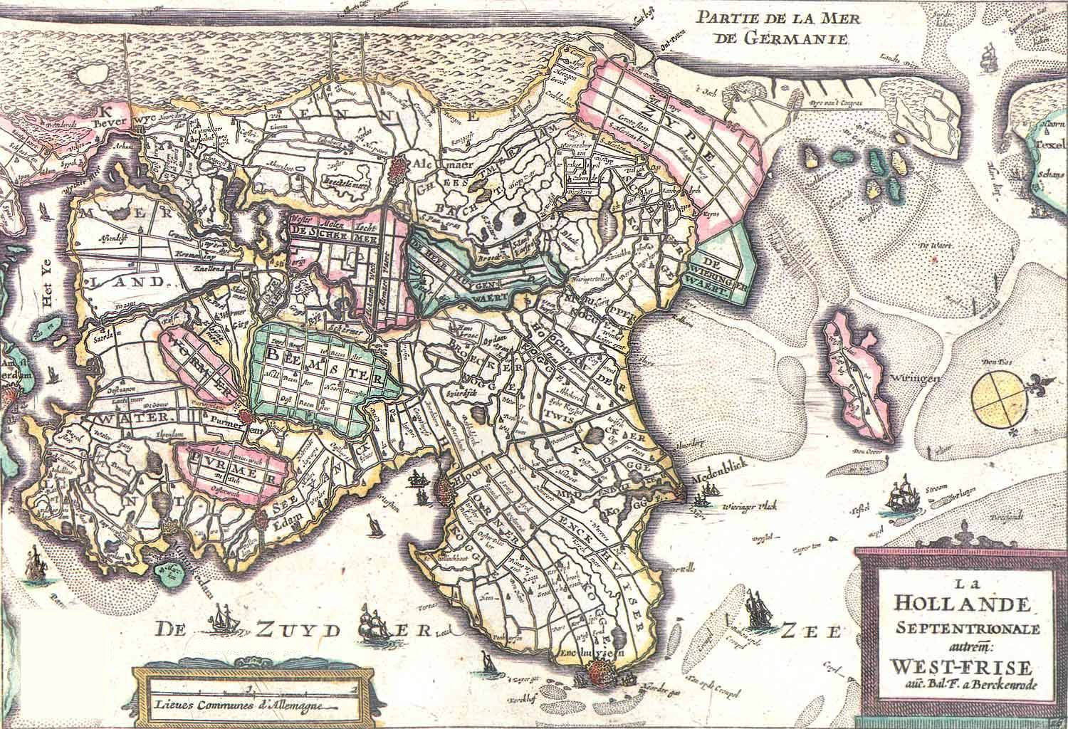 La Hollande Septentrionale. West-Frise uit De Vyerige Colom Verthonende de 17 Nederlandsche Provintien. 17e eeuw. Public Domain Ed Stevenhagen 31 jul 2005 00:57 (CEST)